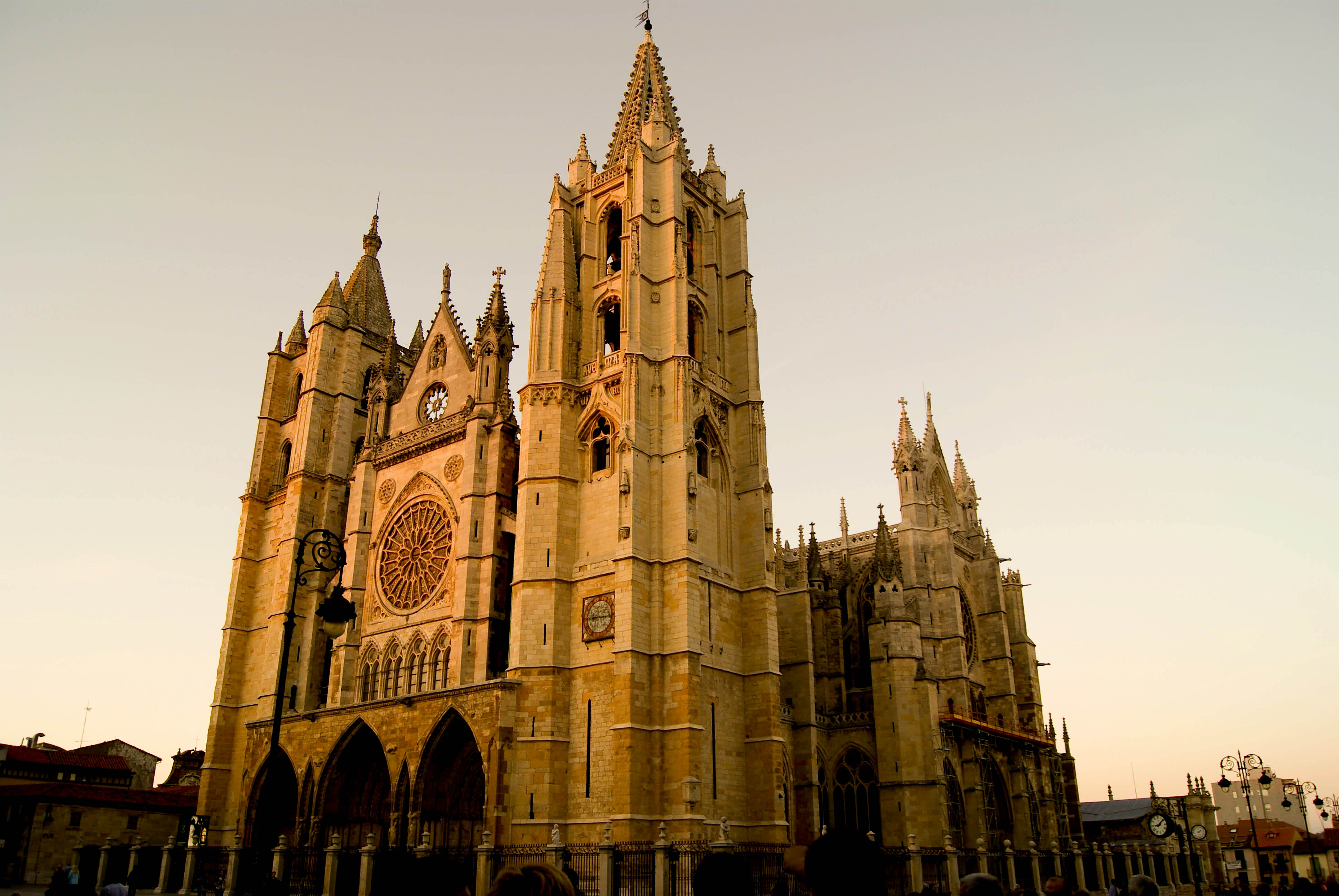 La actual catedral de León, iniciada en el siglo XIII, presenta un diseño del más depurado estilo gótico clásico francés. Conocida como la pulchra leonina o catedral de santa María de Regla.